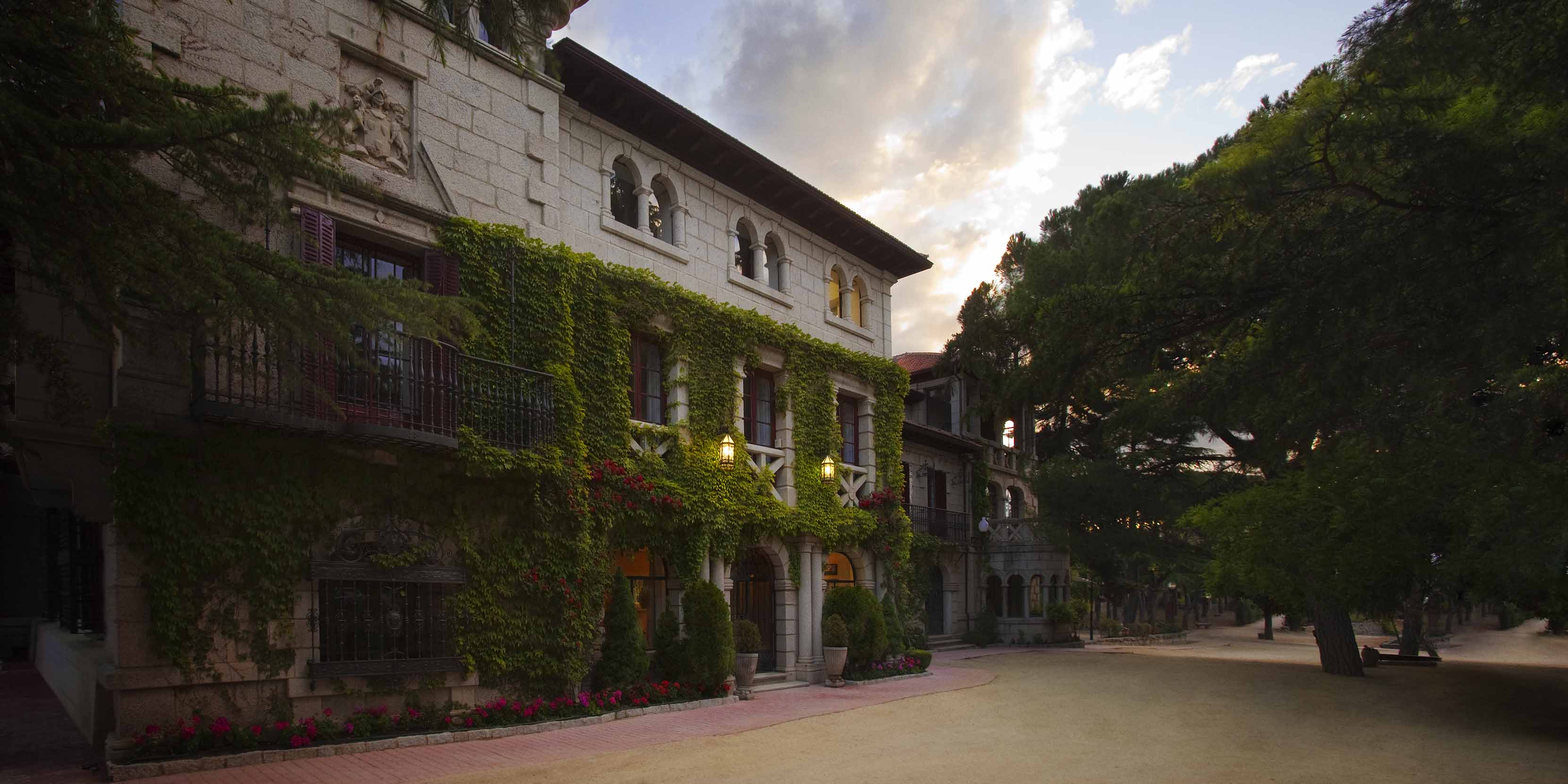 Fachada principal del campus de La Berzosa de la Universidad Nebrija